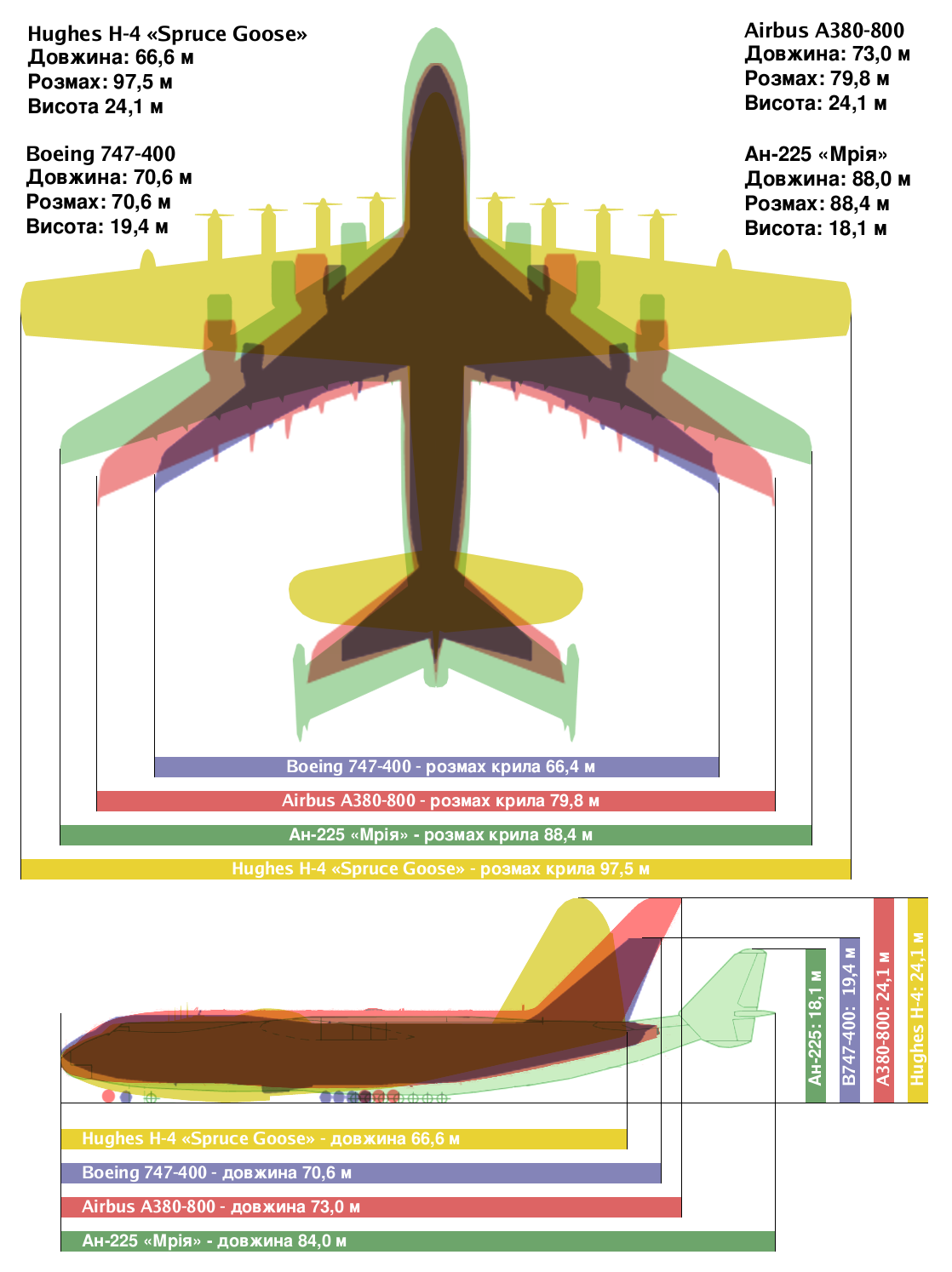 Діаграма показує порівняльні розміри чотирьох найбільших літаків Hughes H-4, Boeing 747-400, Airbus A380 і Ан-225